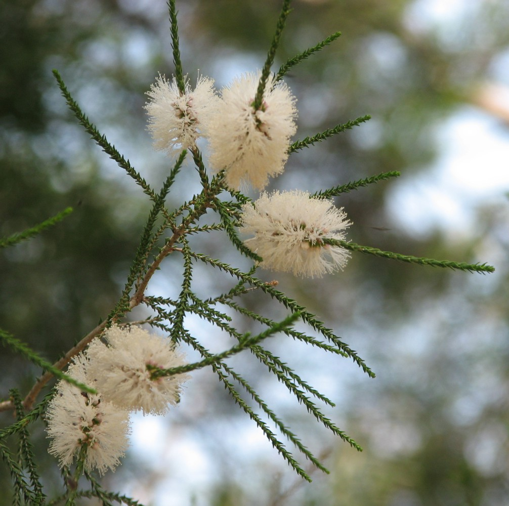 Melaleuca huegelii, cultivated, Parkville, Victoria, Australia